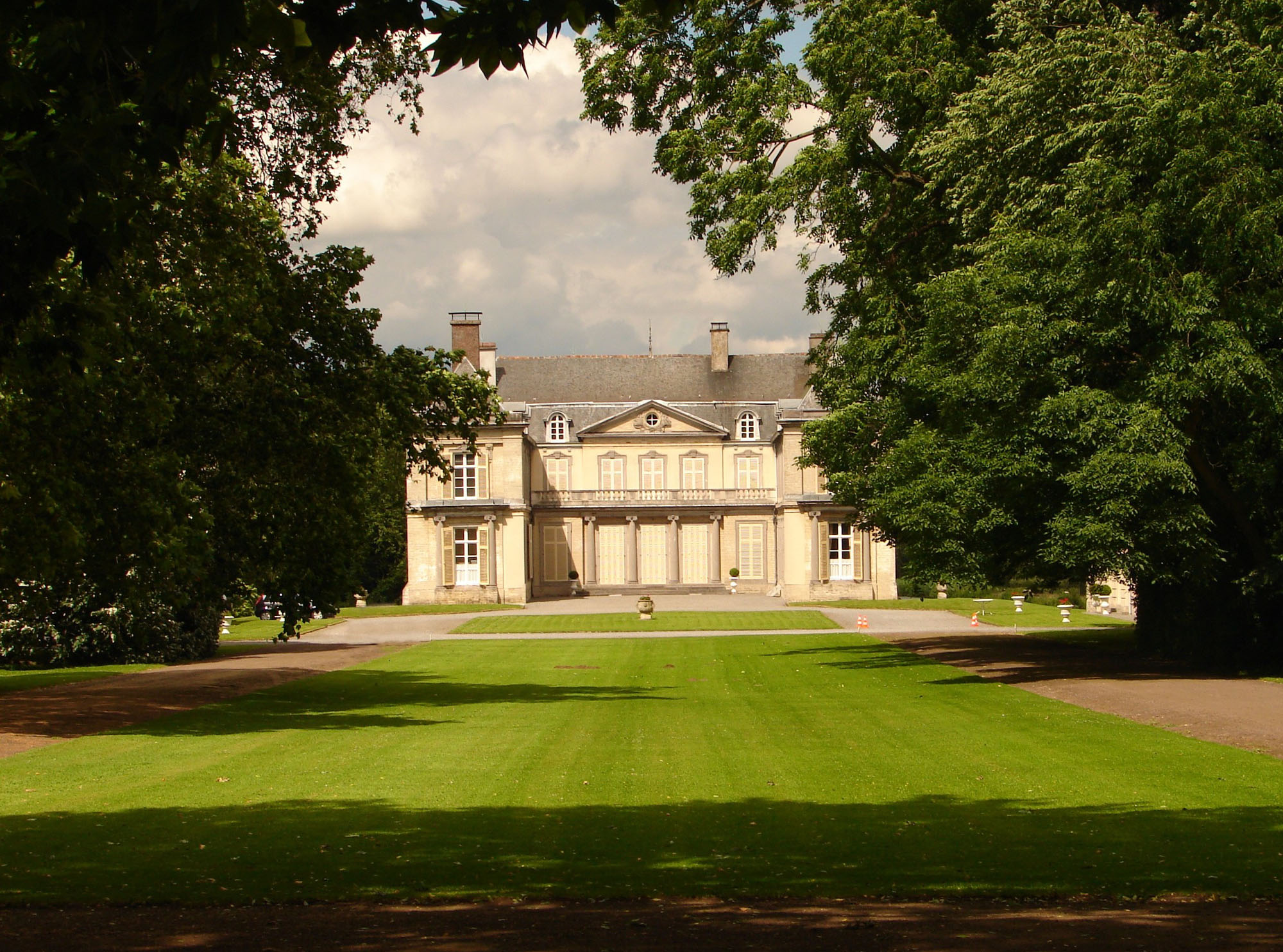 Kasteel de Mérode te Everberg